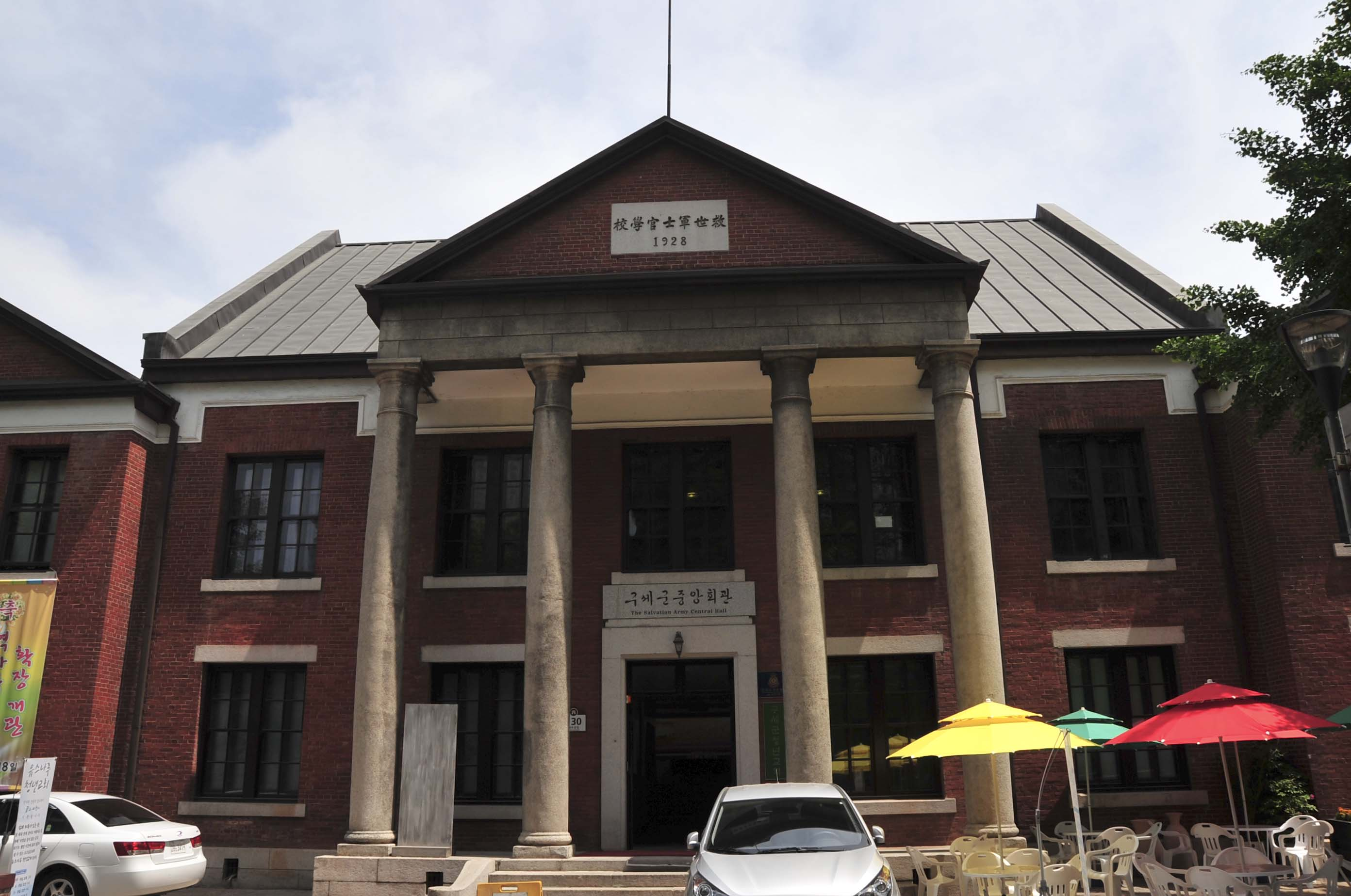 구세군 대한본영